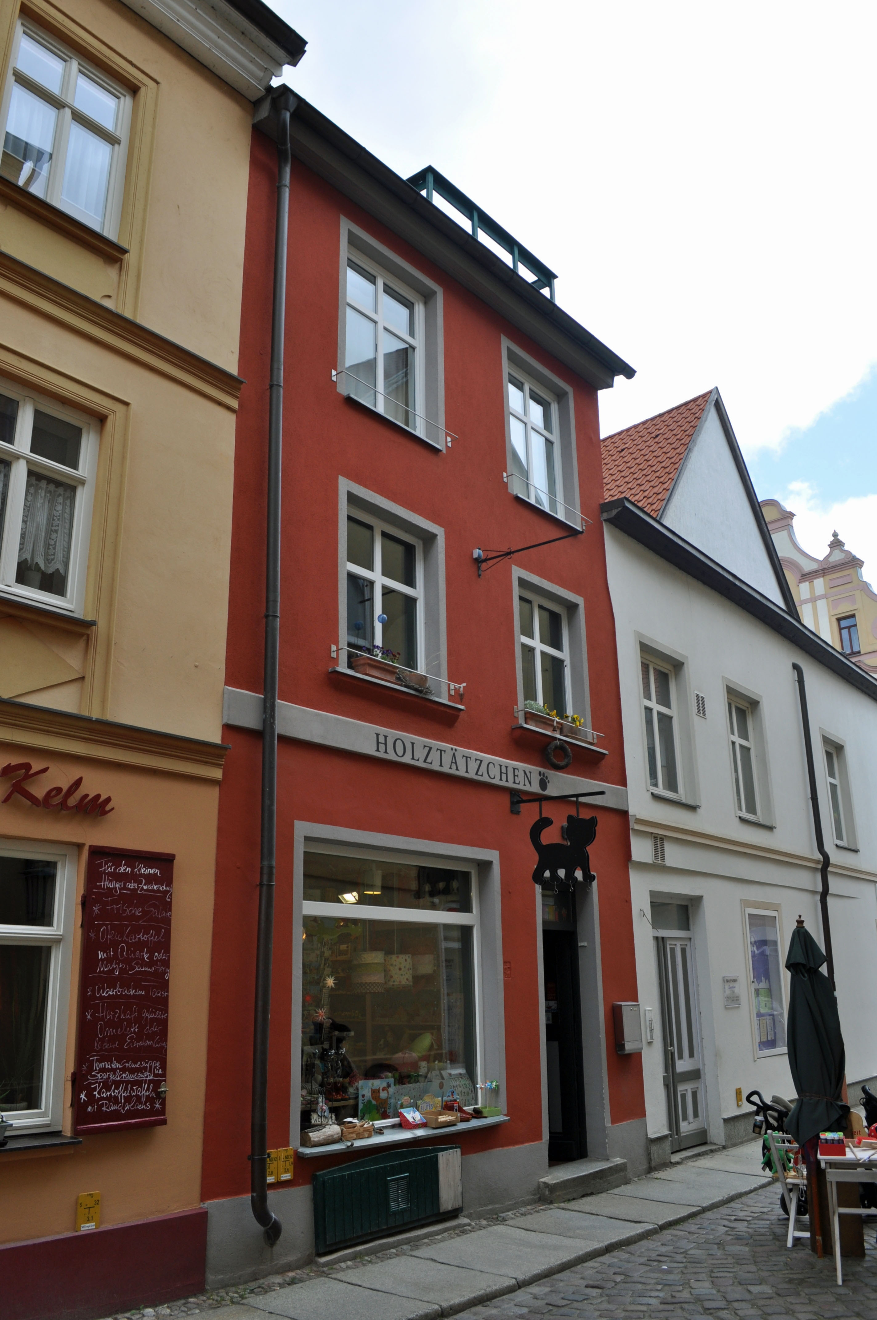 Gebäude in Stralsund, siehe Dateiname